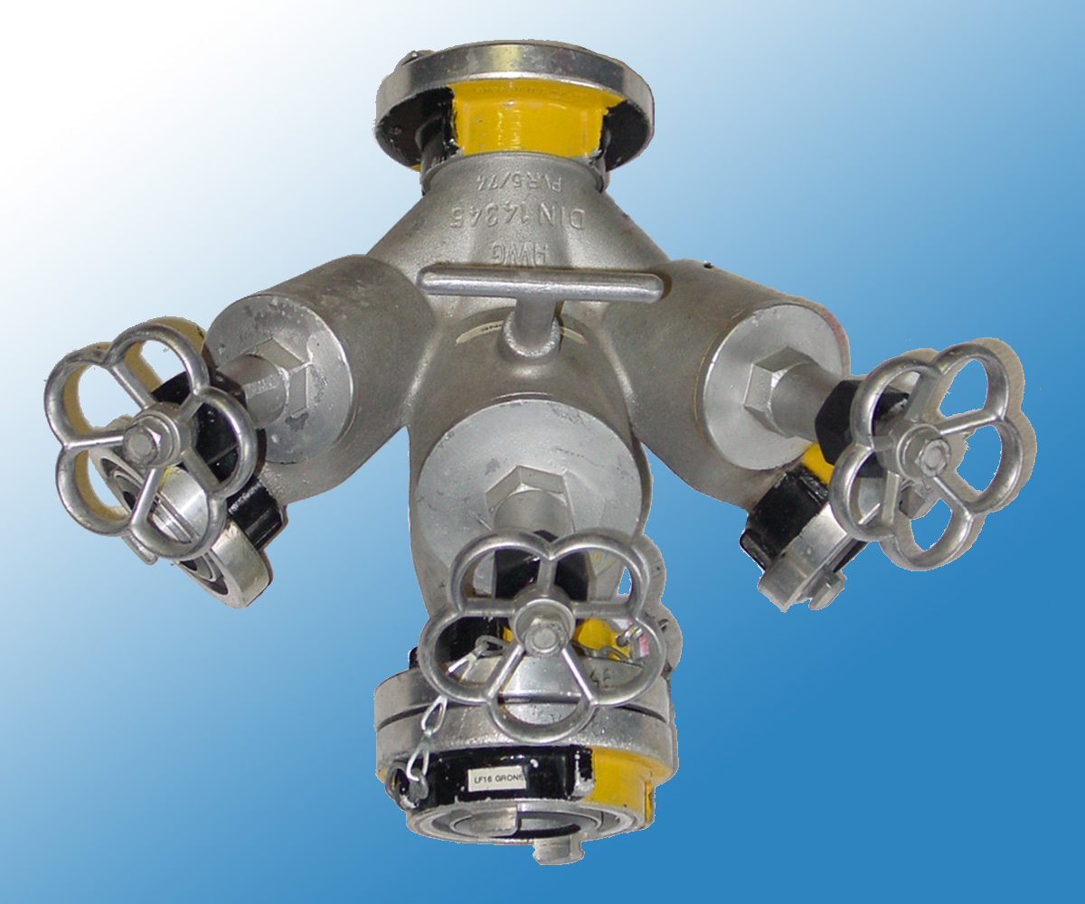 Verteiler